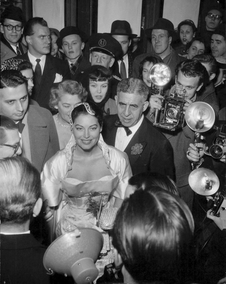 Den vackra Ava Garder är tydligen en blyg flicka. I stället för att göra entré genom parketten och upp på tribunen som en premiärstjärna höves, presenteras hon mitt framför publiken och efter applådstormar hålla det vanliga lilla älskvärda talet, omtalande hur lycklig hon var att möta den svenska publiken och hoppandes att den skulle tycka om hennes film, slutande med ett litet sött "tack så mycket" – i stället för allt detta alltså valde hon att smita in bakom ryggen på balkongpubliken ned i en sidologe och sätta sig, utan att säga ett knyst. Och utan att någon annan fick säga ett knyst. Kan man tänka sig! Kanske hyllar hin den av många genomförda principen bilde Künstler, rede nicht. Eller också är hon som sagt blyg. Vacker som en dröm satt hon där i helvit galatoalett med pärlbroderier och juveler i sitt svarta hår och log mot kamerablixtarna och applåderna. Och lät sedan konstverket tala. Verket heter alltså "Barfotagrevinnan". Ansvarig författare och regissör: Joseph L. Mankiewicz.